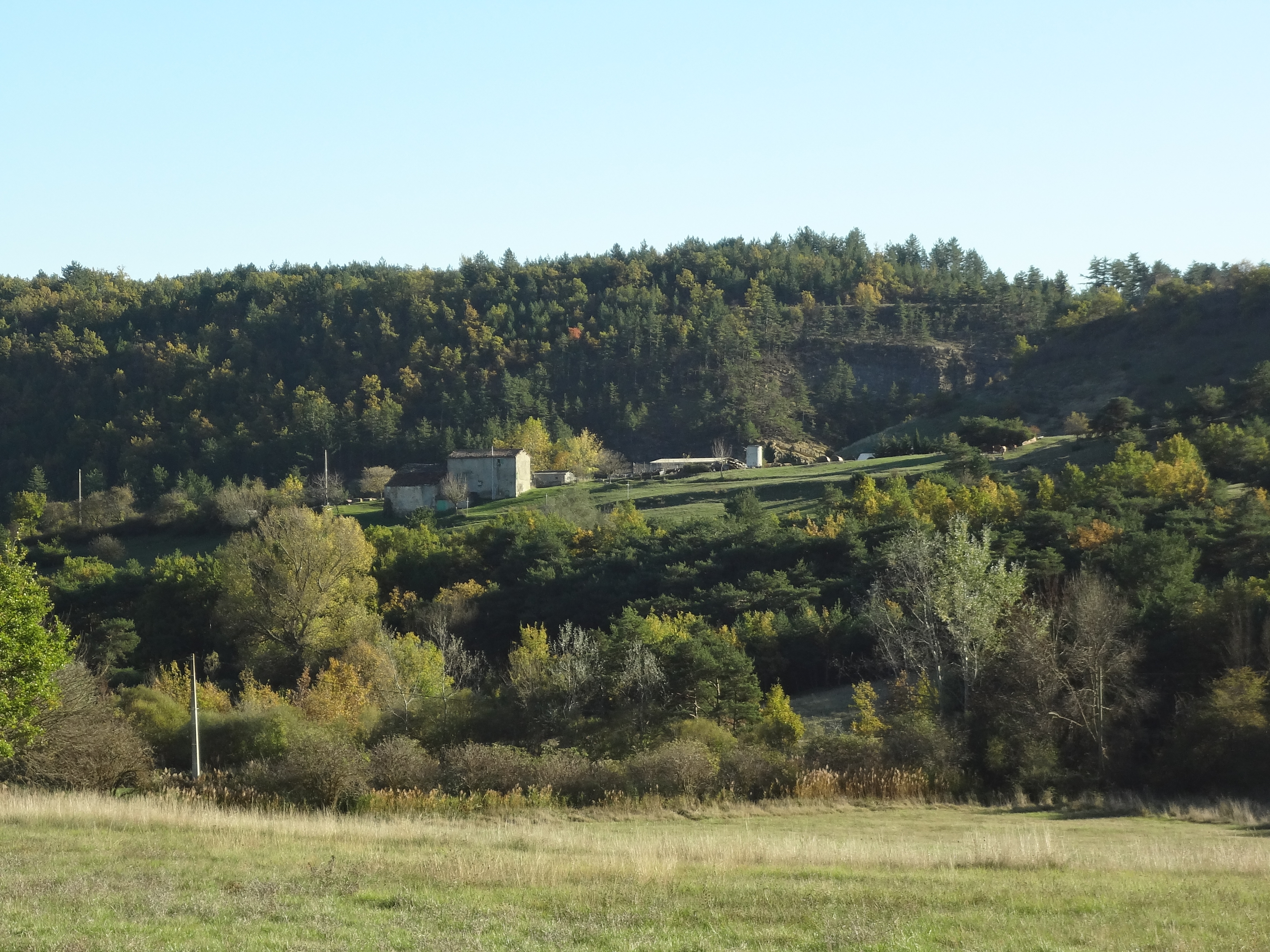 Ferme de la Gavie, à Montlaux